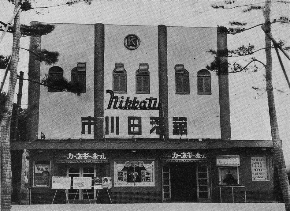 千葉県市川市の市川日活館、1952年の写真。